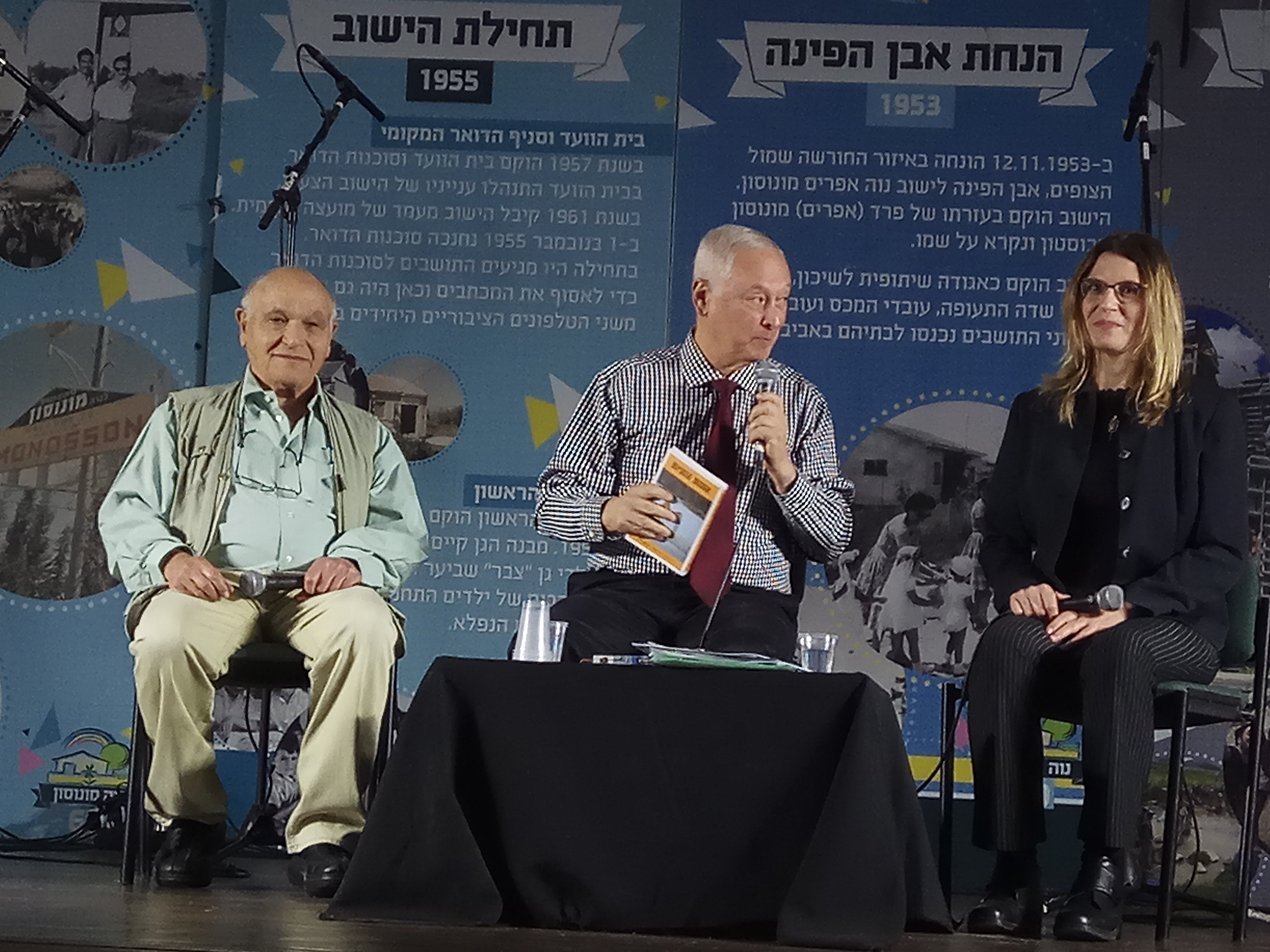 פרופ' משה מעוז ובתו ד"ר דריה מעוז עם אבי בטלהיים בשבתרבות בנווה מונוסון